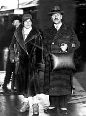 Thomas Mann anländer tillsammans med hustrun Katia till Stockholms centralstation den 10 december 1929 för att ta emot Nobelpriset i litteratur.